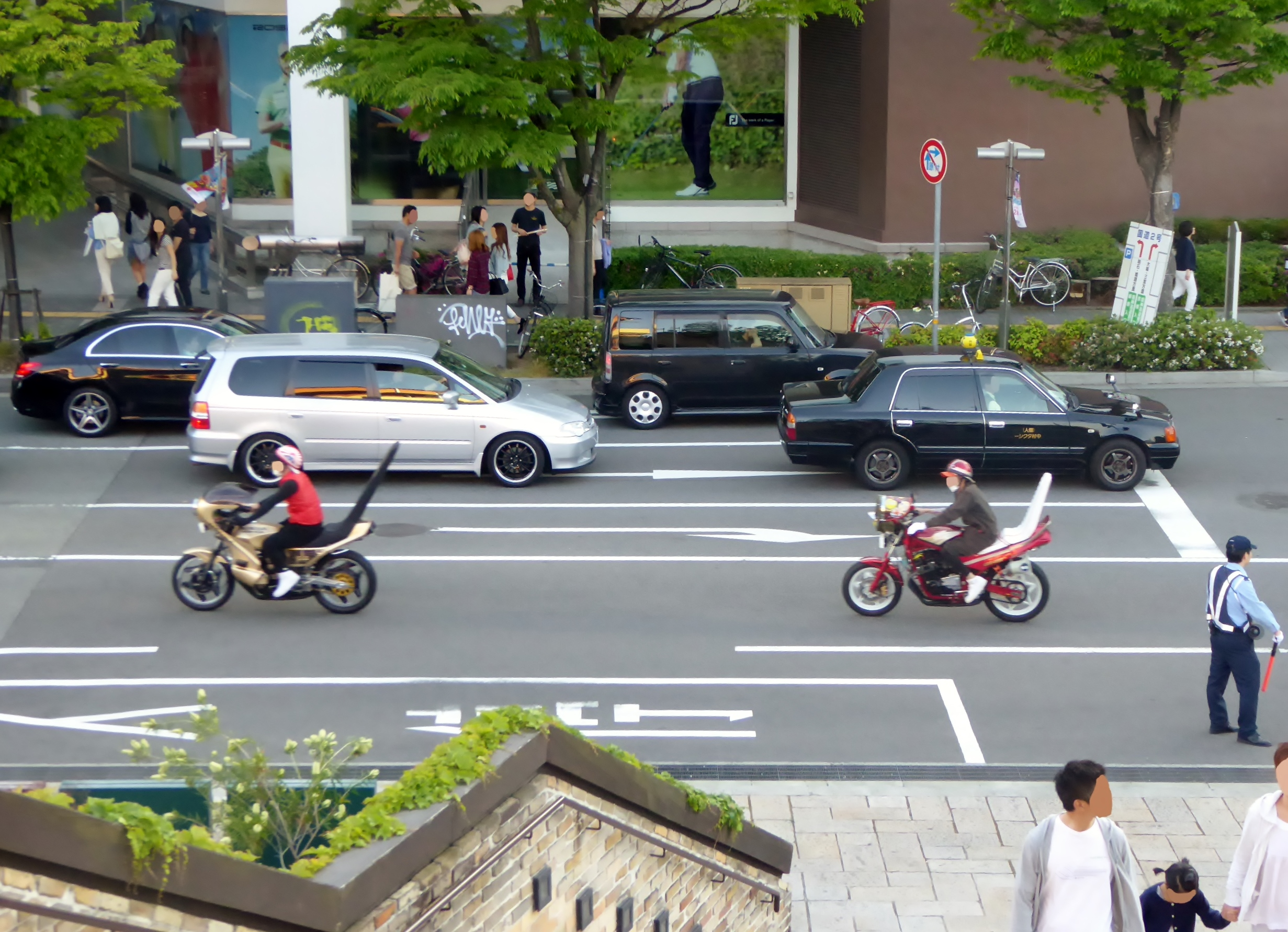 神戸において暴走族を撮影。